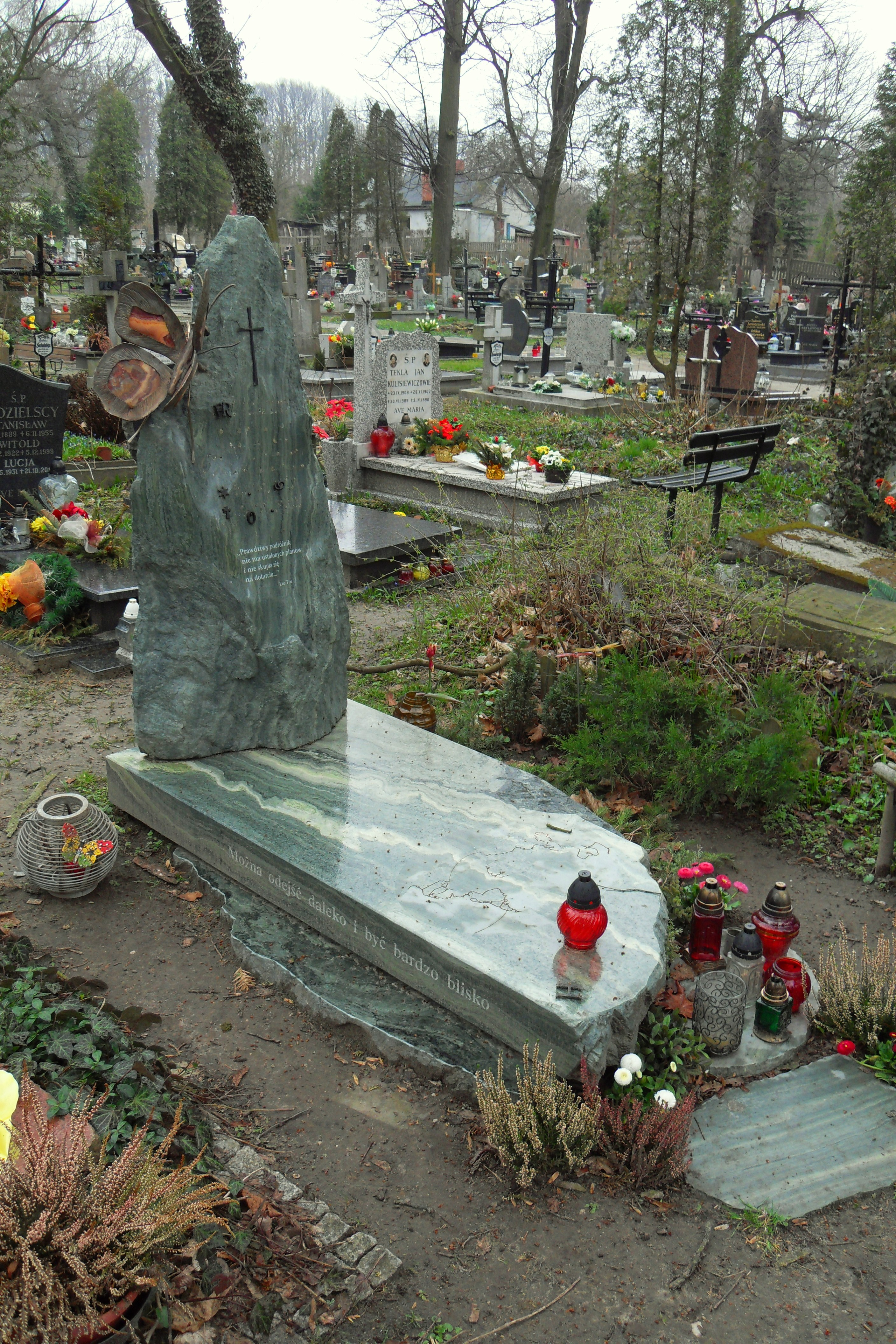 Gdańsk Aniołki. Cmentarz Garnizonowy, zdewastowany grób podróżniczki Kingi Choszcz.